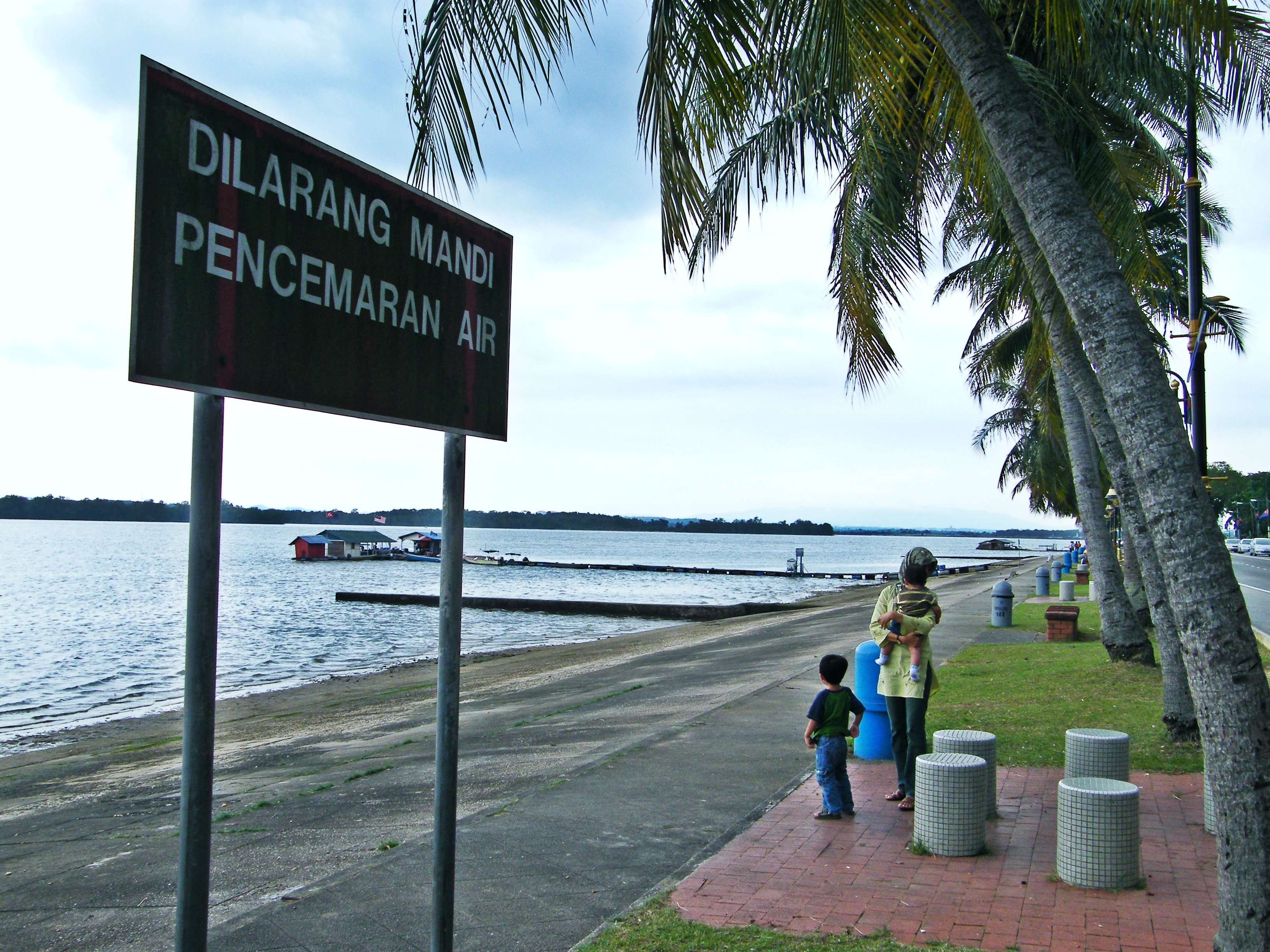 Danga Bay recreational park